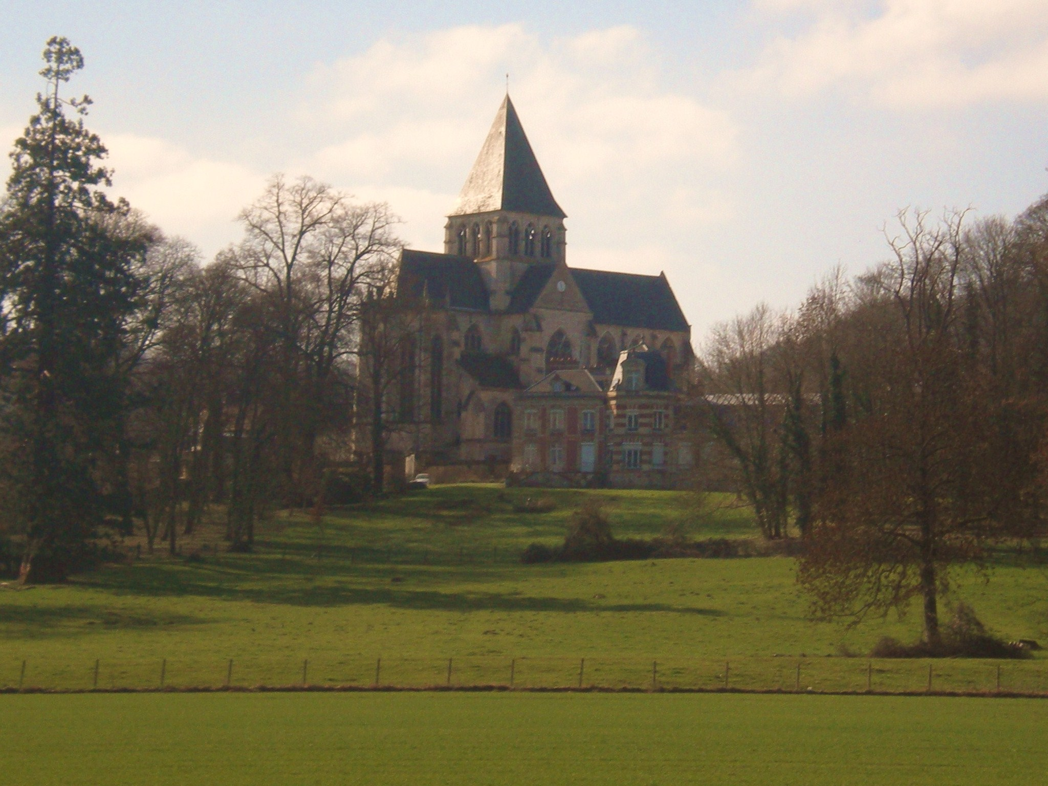 l'église d'agnetz